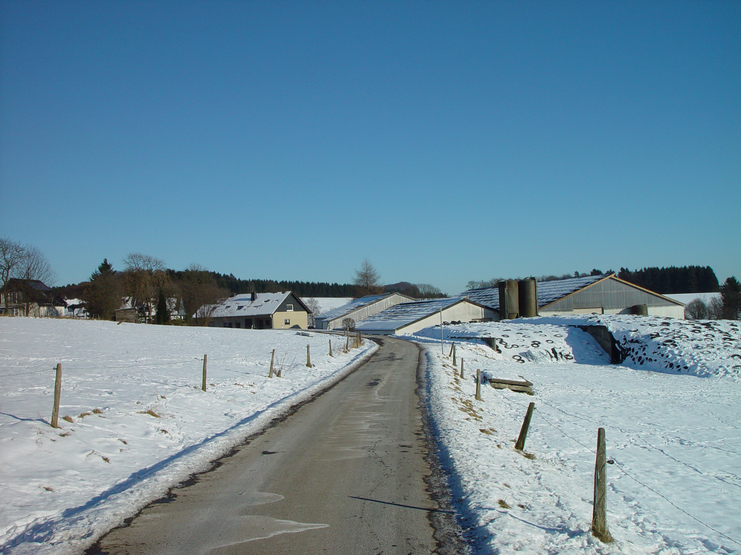 Hückeswagen Scheuer